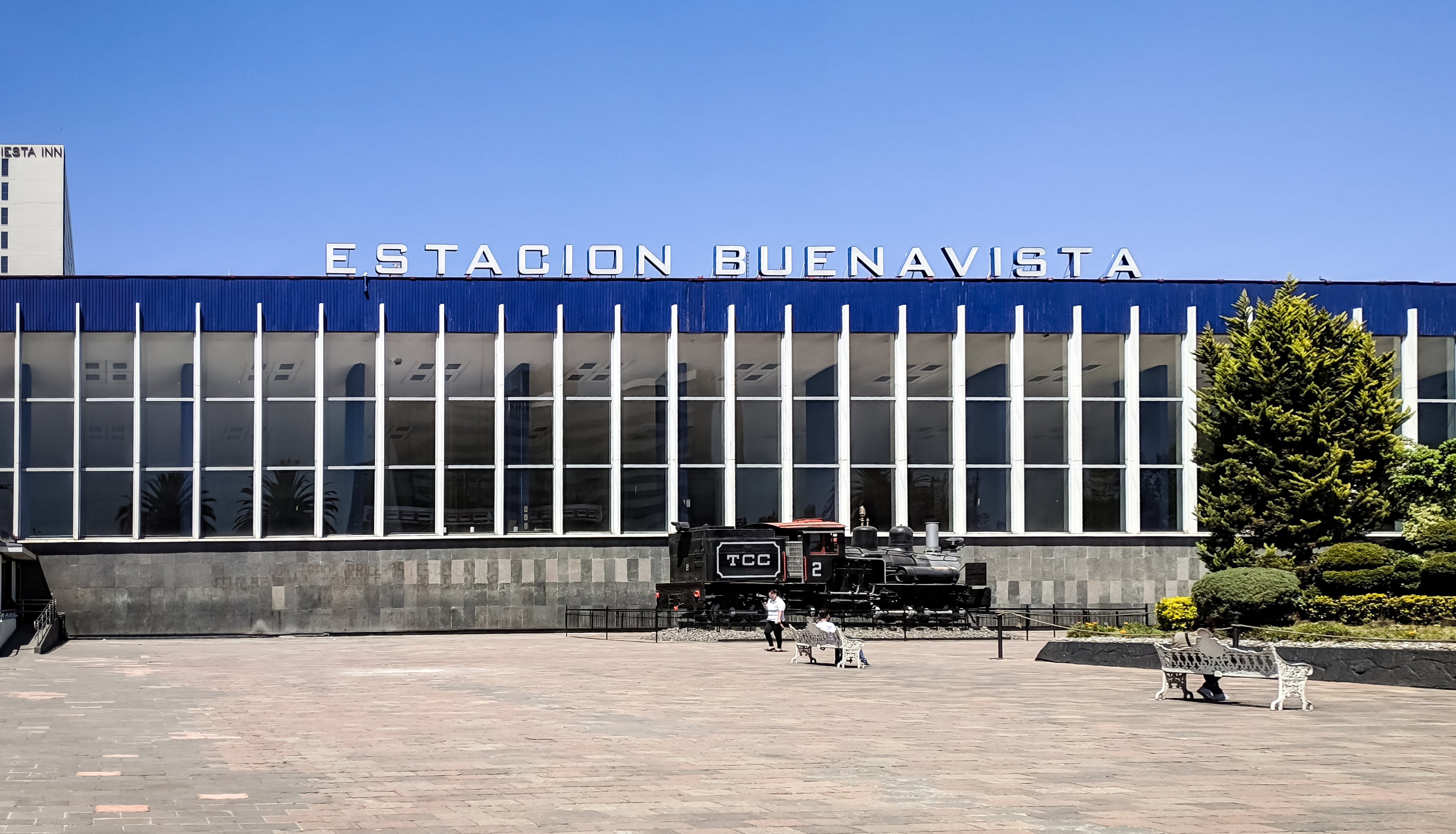 Estación Buenavista en la Ciudad de México, 2019